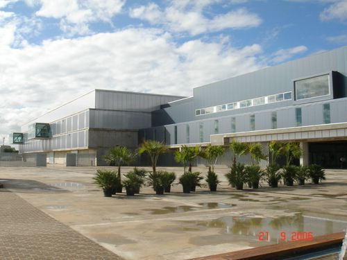 Imagen parcial de las instalaciones de IFEBA